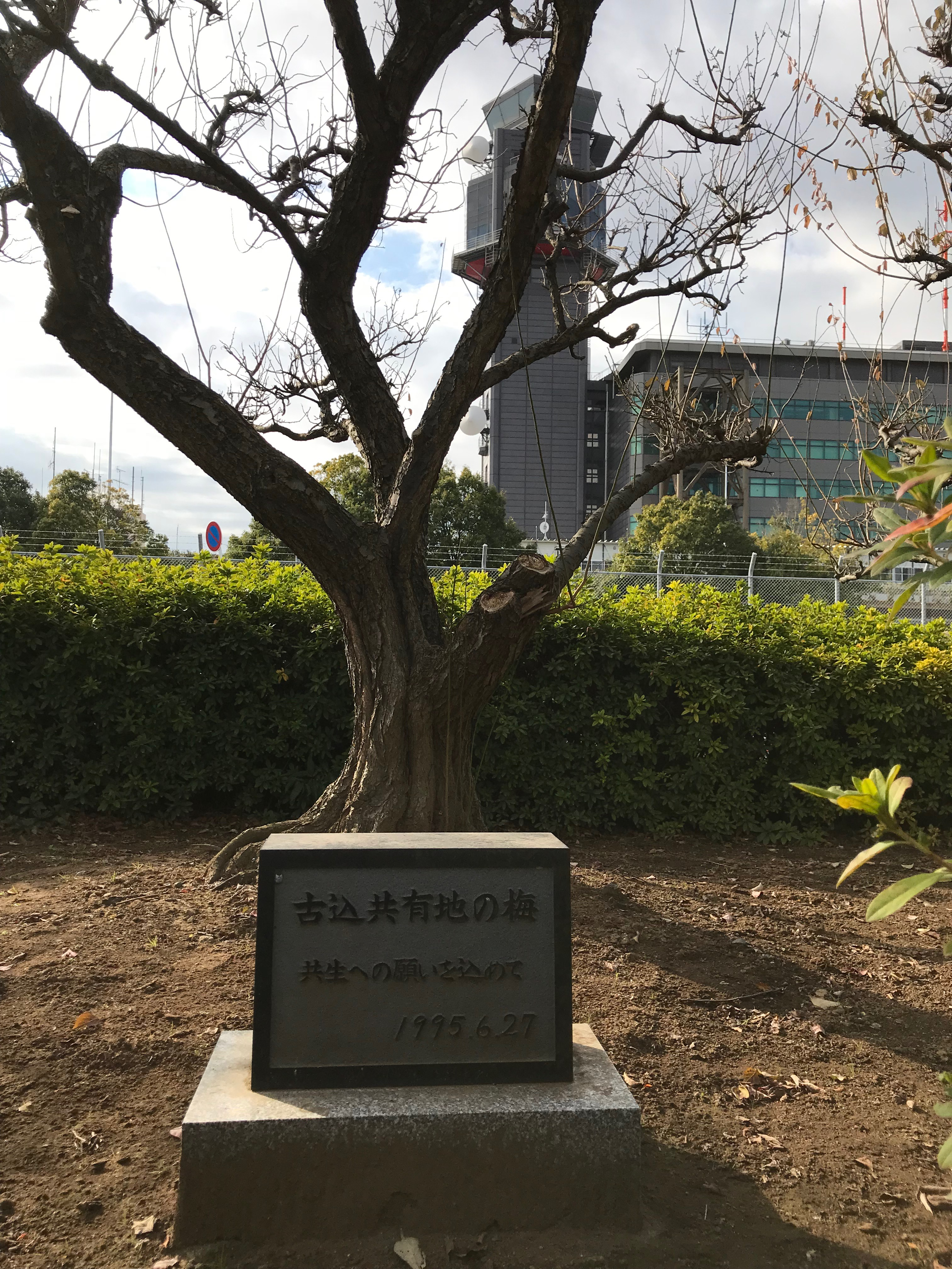 古込共有地の梅（記念碑）「共生への願いを込めて 1995.6.27」